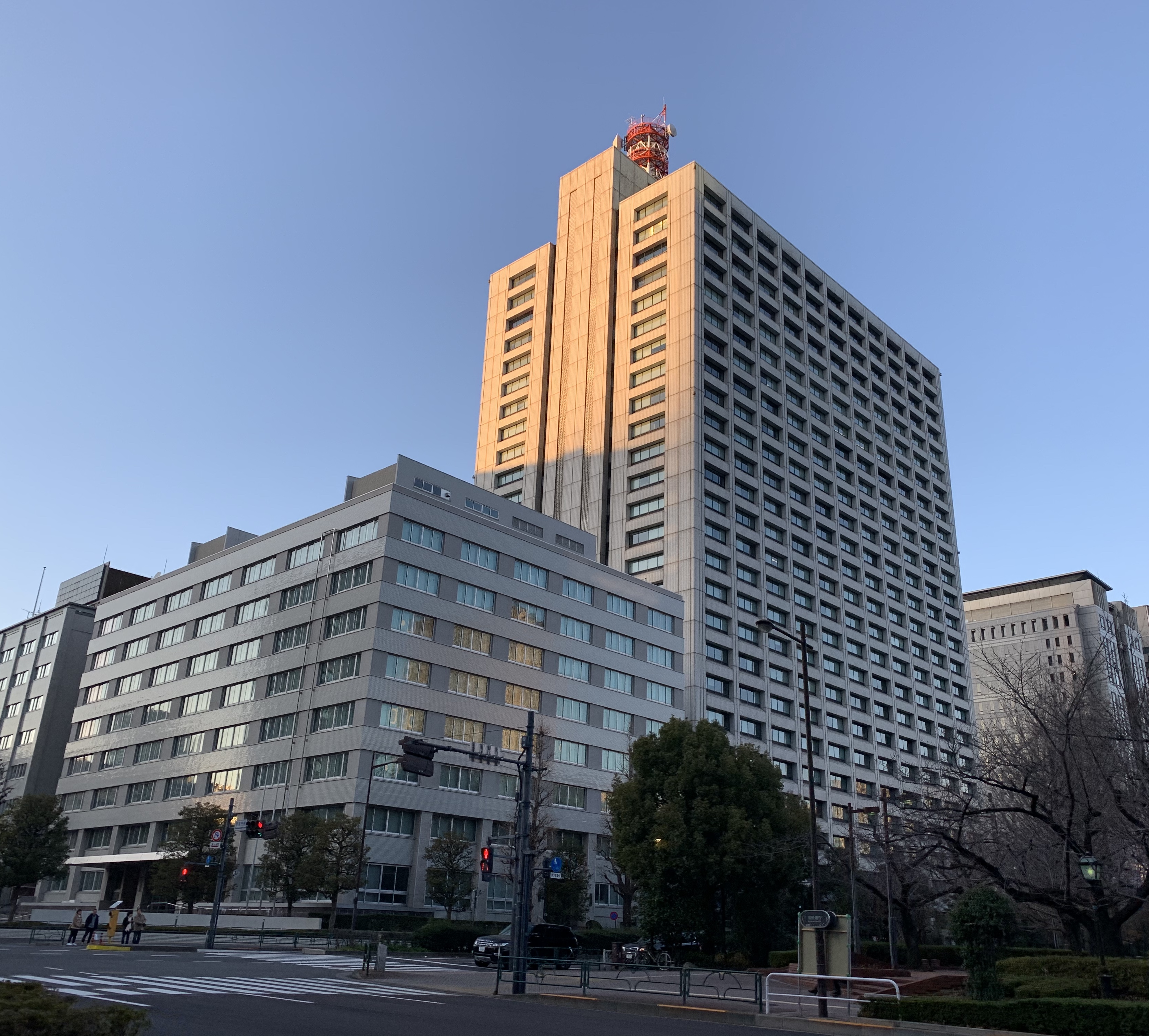 2020年1月3日16:09 撮影